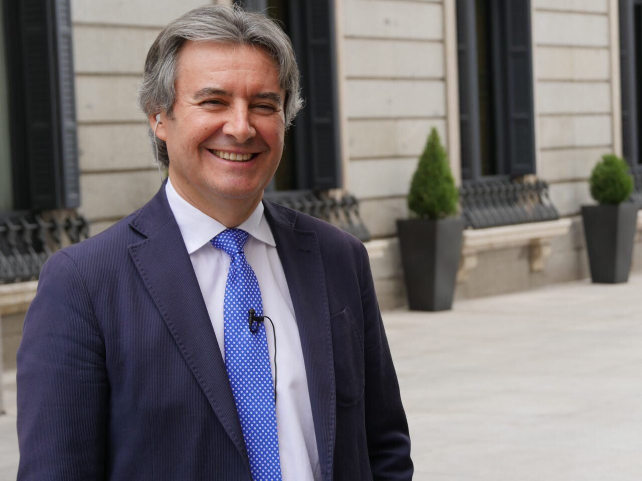 Ruben Moreno Palanques en el Congreso de los Diputados